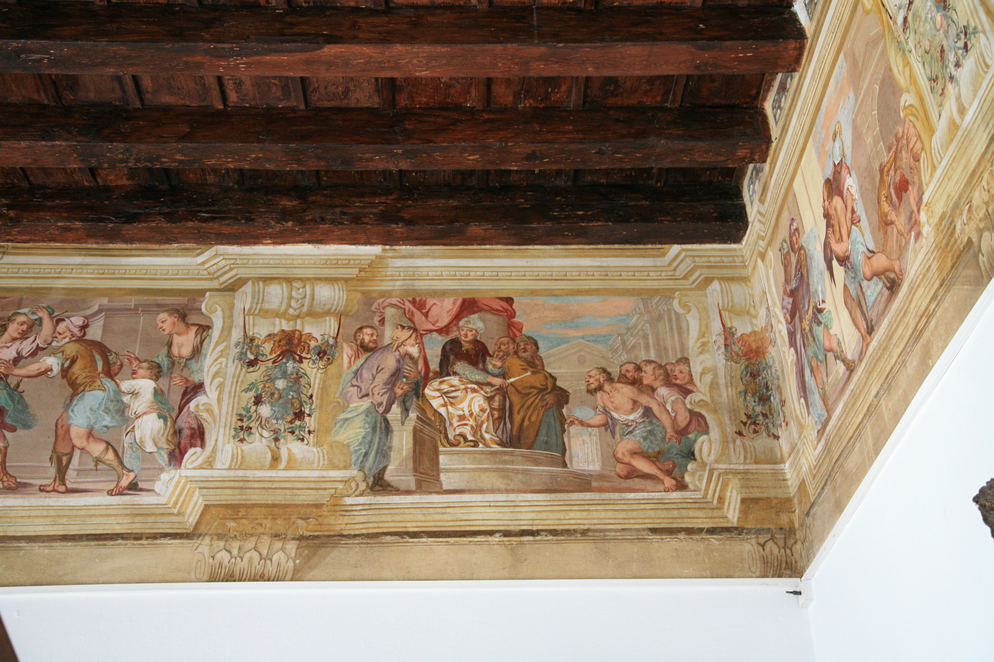 Villa Valmarana at Vigardolo di Monticello Conte Otto